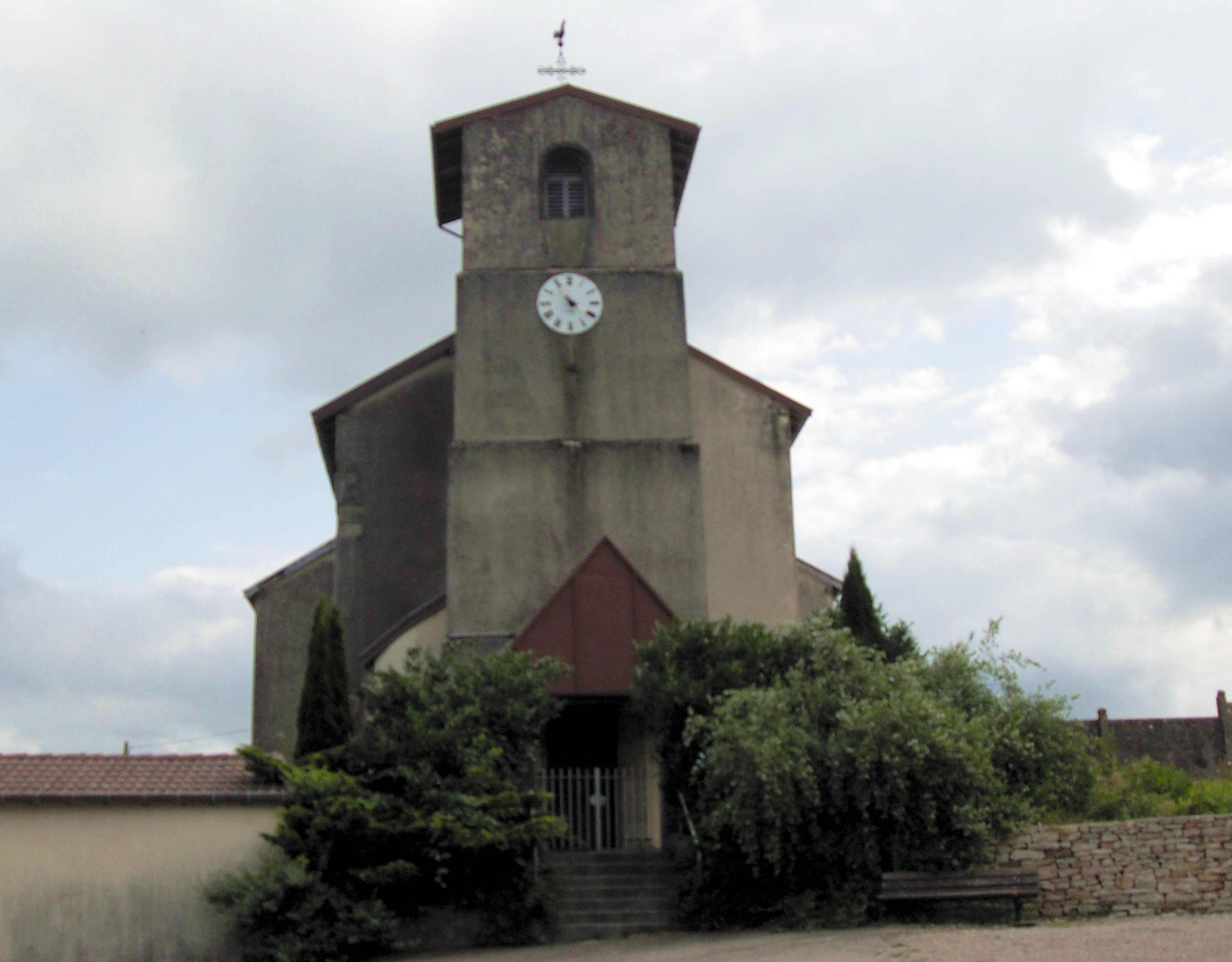 L'église Saint-Martin de Madegney